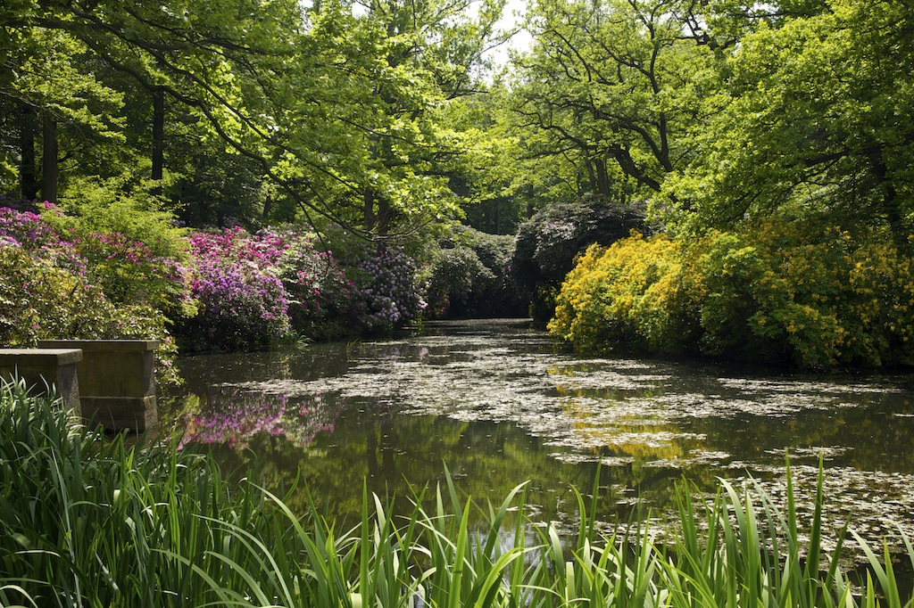 Schlossteich Hornjoserbsce: W Hušćanskim hrodowym parku.